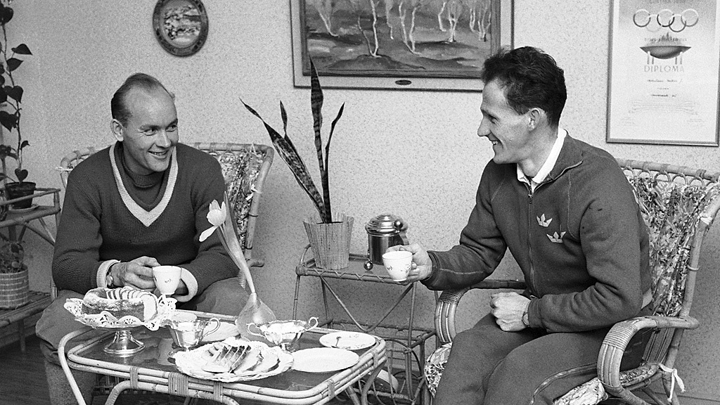 Veikko Hakulinen (left) and Sixten Jernberg